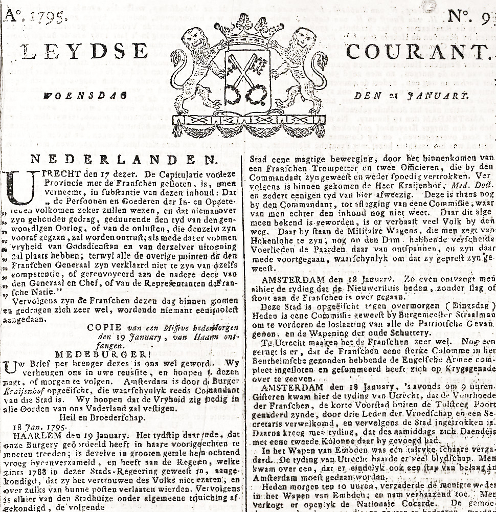 Leydse Courant no 9 van 1795, detail voorpagina met berichtgeving over de capitulatie aan de Fransen. Vanaf het volgende nummer (10, 1795) zal de republikeinse leus Vryheid, Gelykheid, Broederschap boven de banner gedrukt worden.